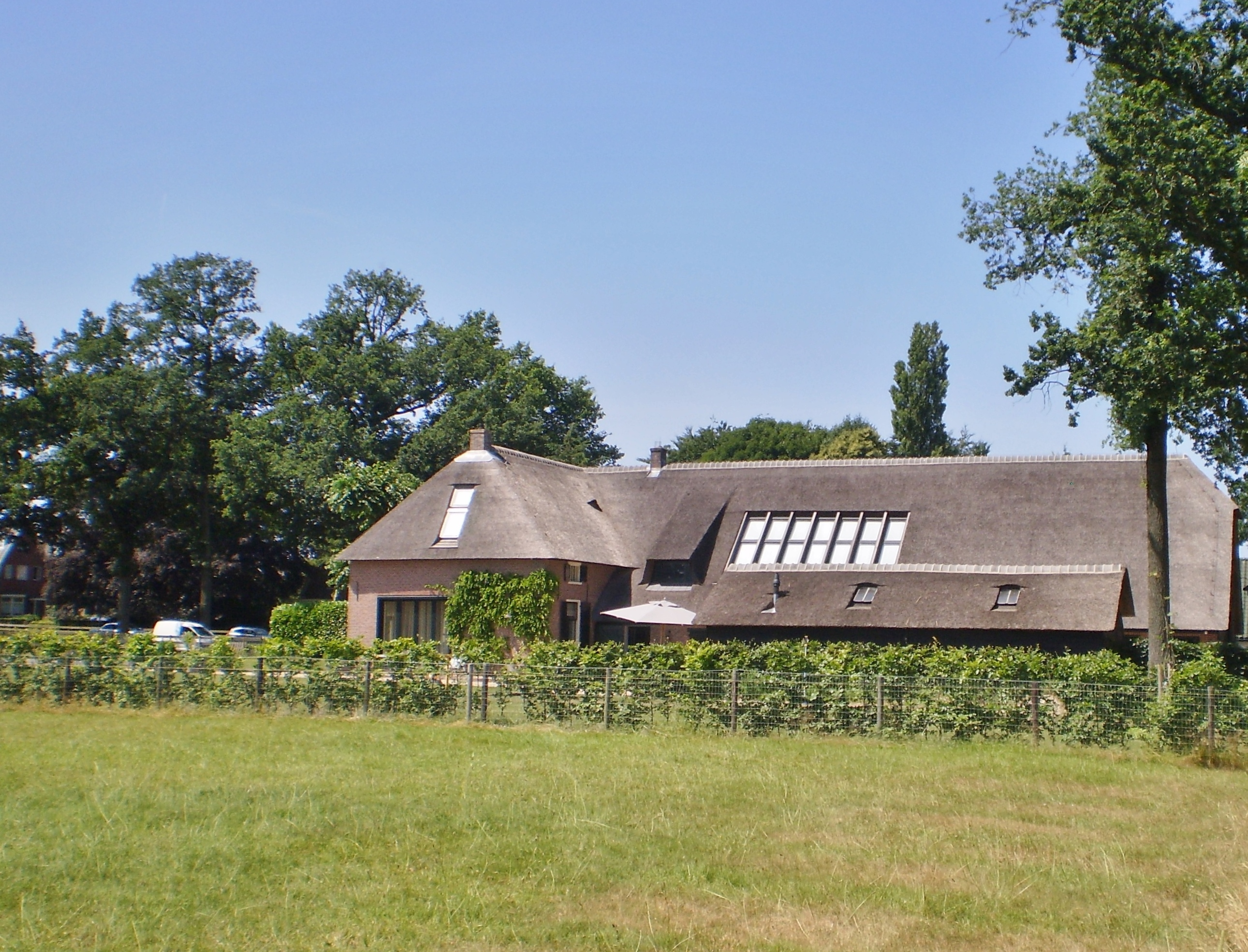 Blijendaal